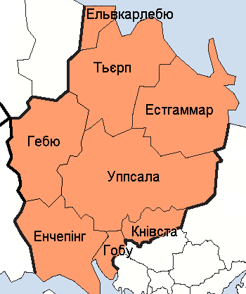 Карта адміністративного поділу лену Уппсала у Швеції. Карту створено на основі карти File:Uppsala County.png.